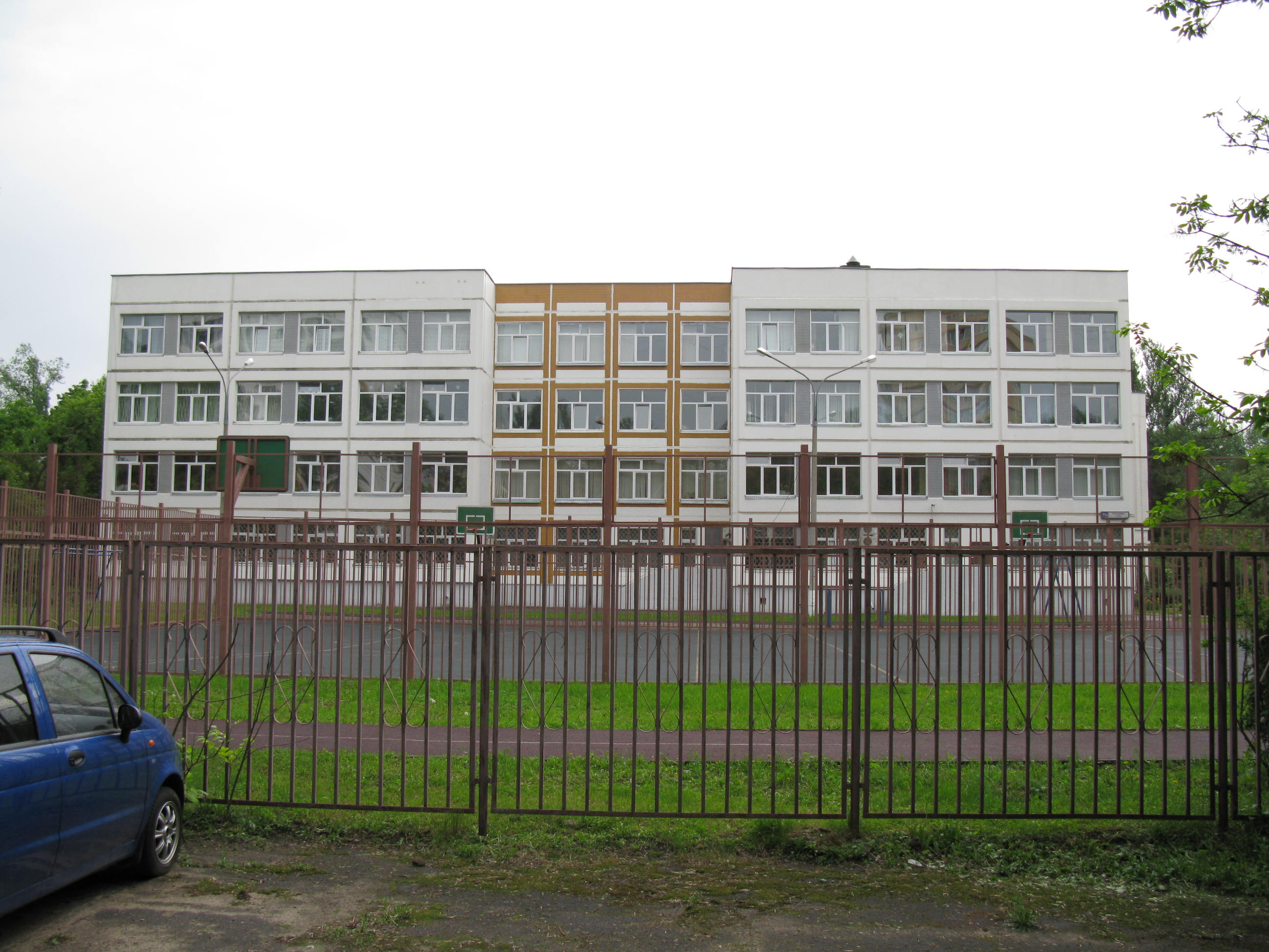 Центр образования № 422. Перово. Москва.